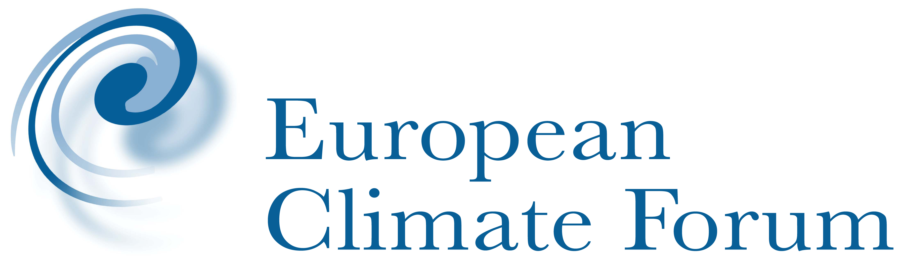 Logo des European Climate Forum